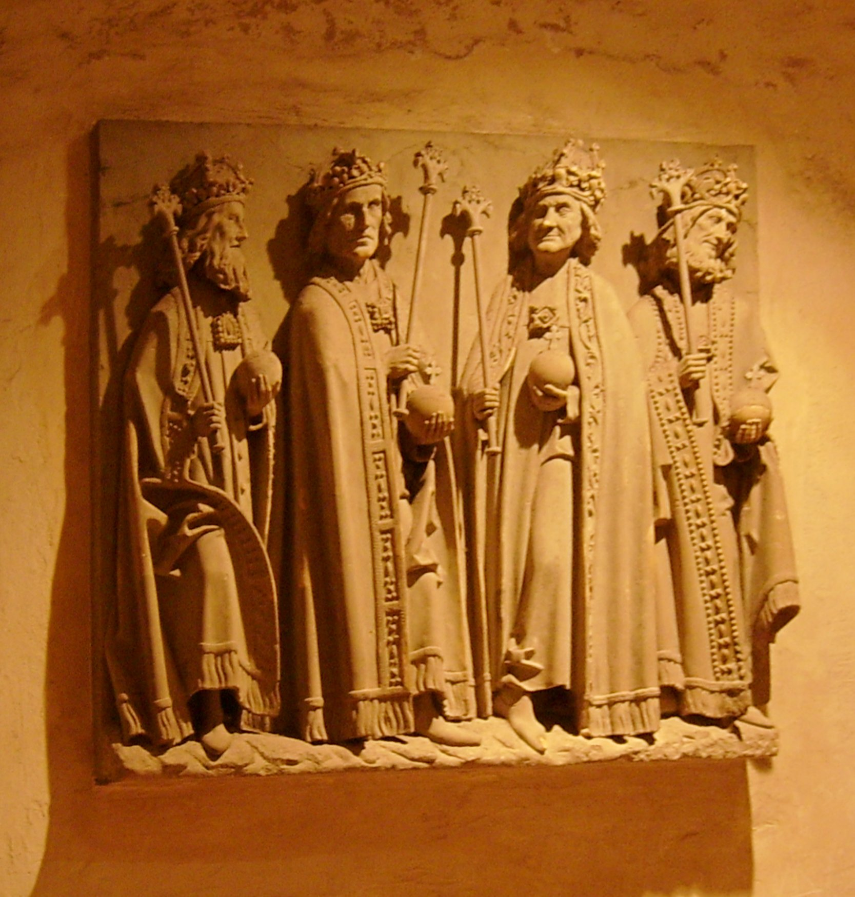 Krypta im Dom zu Speyer